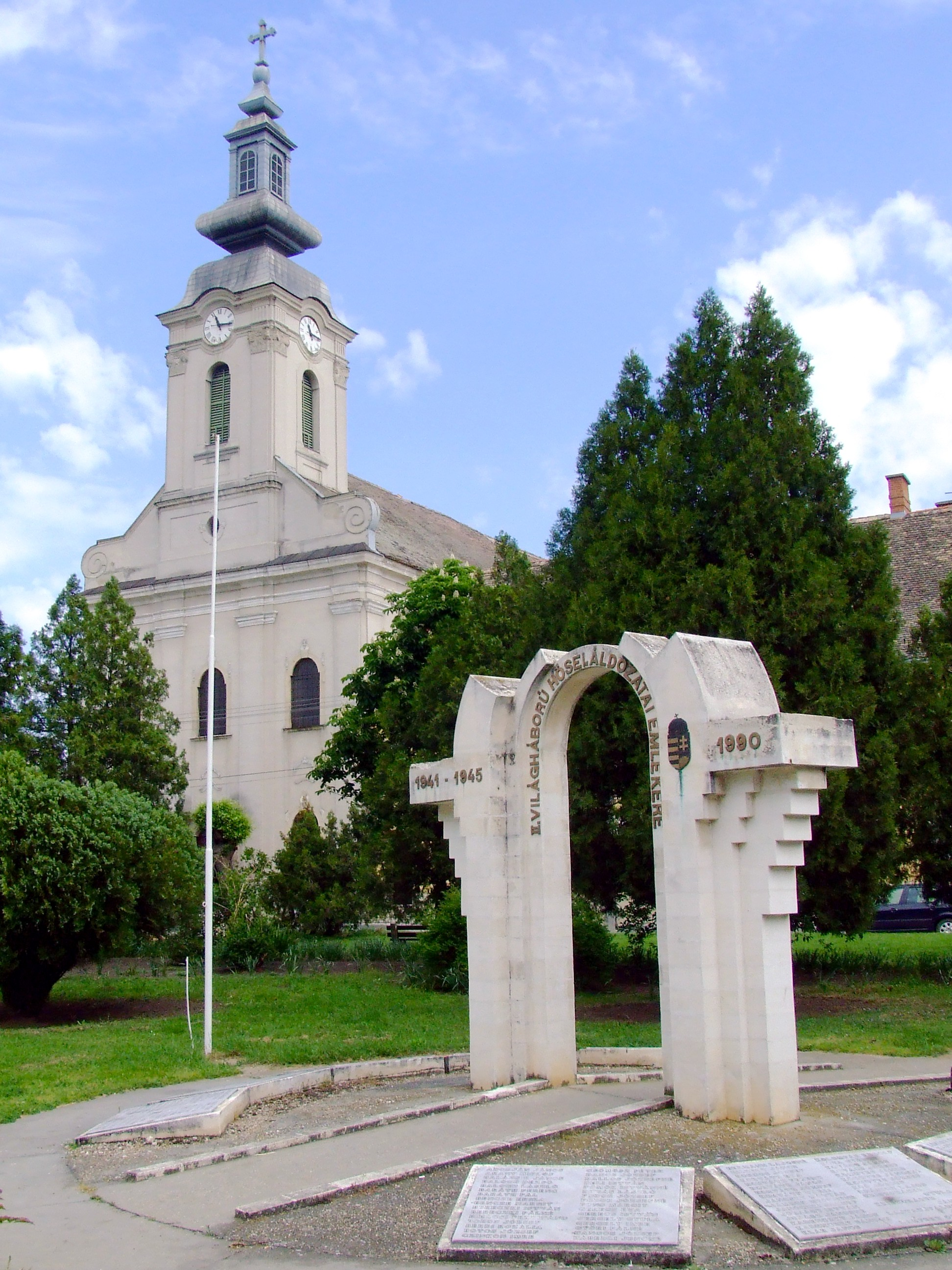 Római katolikus templom és II. világháborús emlékmű Simontornyán. A Szent Simon és Júdás Tádé apostolok tiszteletére szentelt templomot a ferencesek építtették 1734-1760 között (tornya 1771-ben épült), barokk stílusban. A második világháborús emlékmű, Novák István alkotása 1990-ben épült.